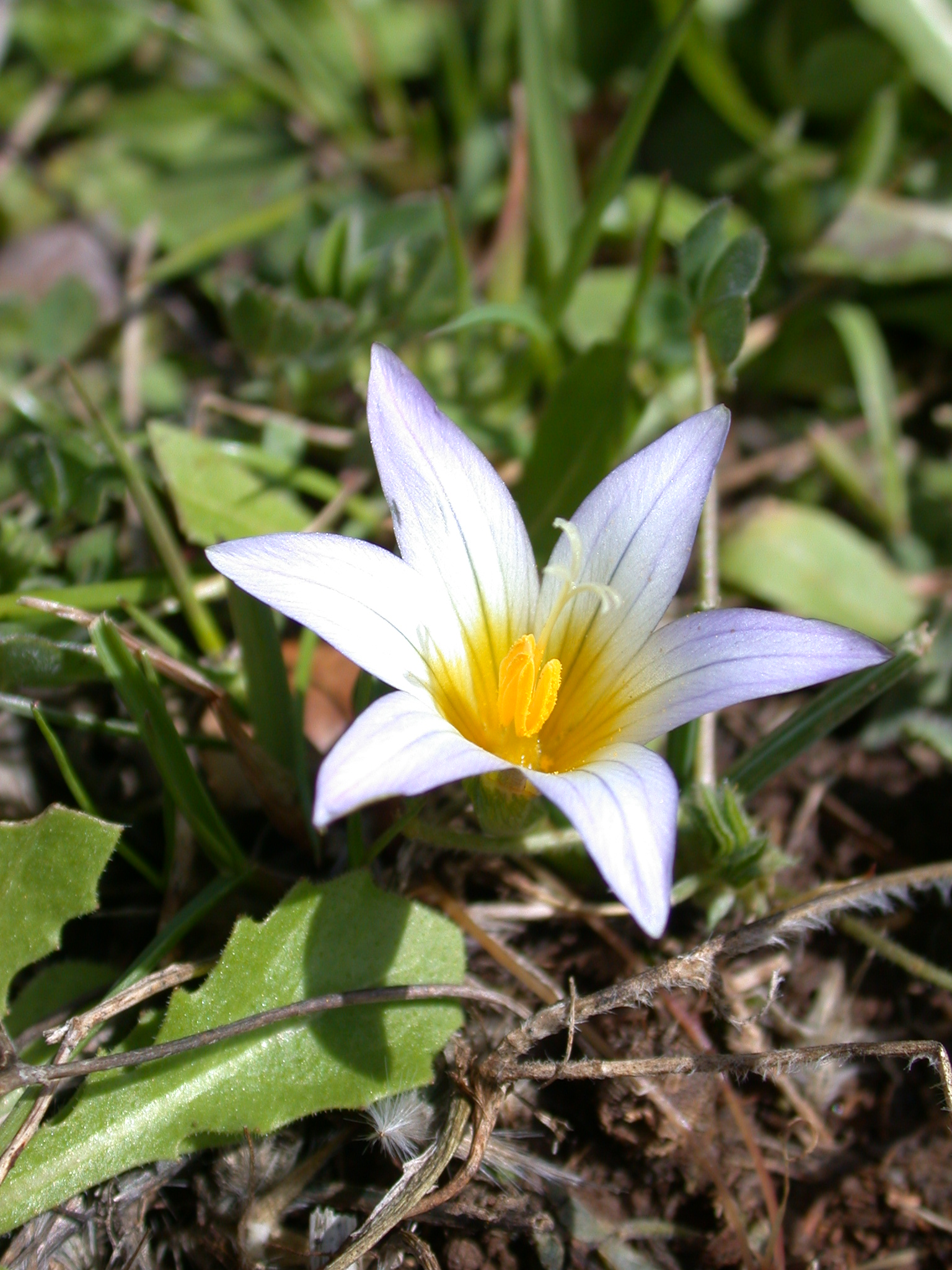 Romulea bulbocodium (L.) Sebastiani & Mauri (רומוליאה סגלולית), Har Shezor, Upper Galilee, Israel, February 7, 2007.